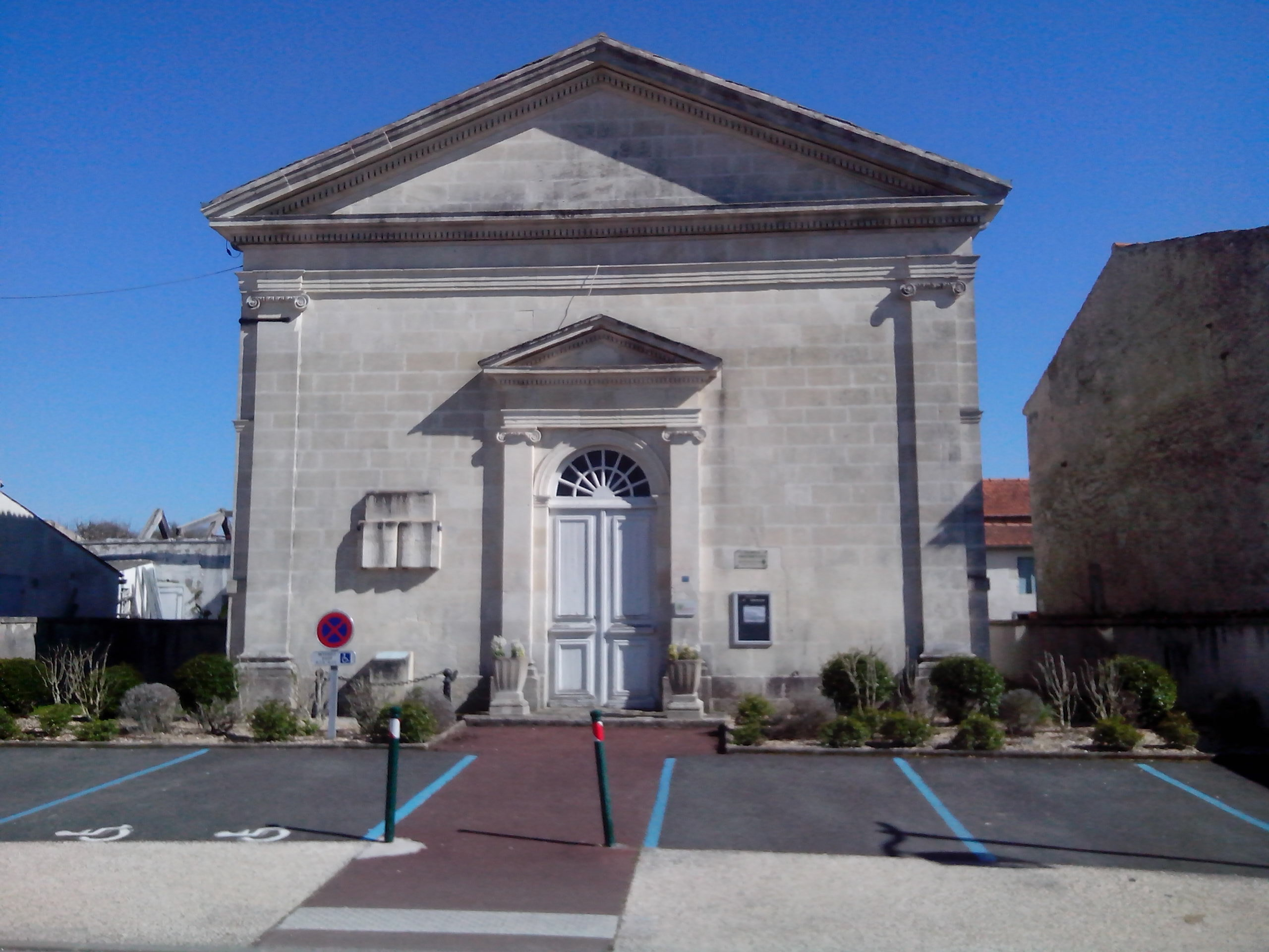 Le temple protestant de Breuillet